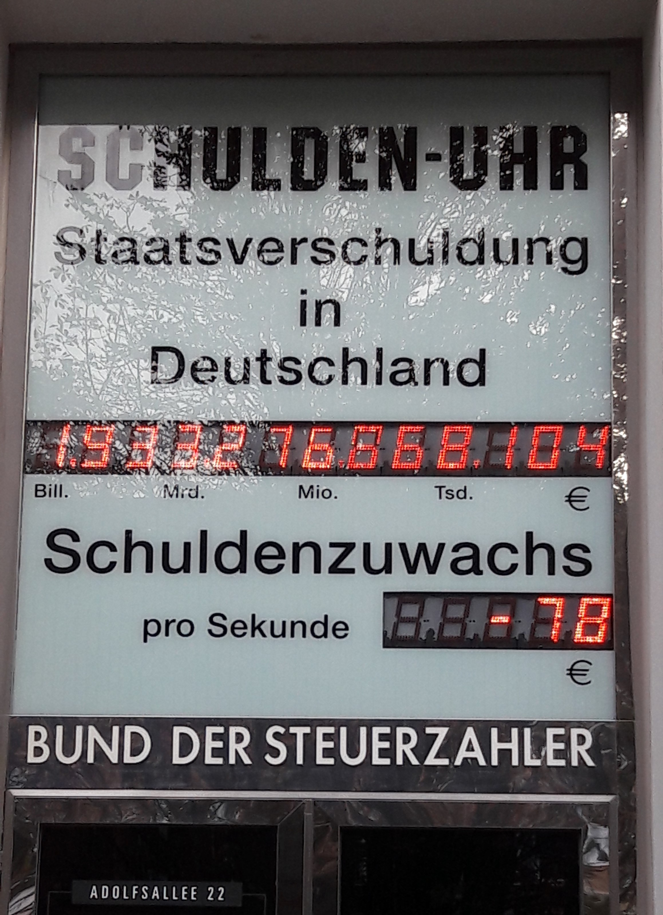 Die Schuldenuhr des Bundes in Wiesbaden vom Oktober zeigt die "Minus-Verschuldung" Stand Oktober 2018